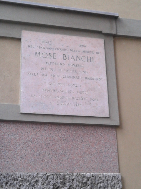 Immagine della placca apposta sulla casa natale di Mosé Bianchi a Monza, via Carlo Alberto angolo via Achille Mapelli